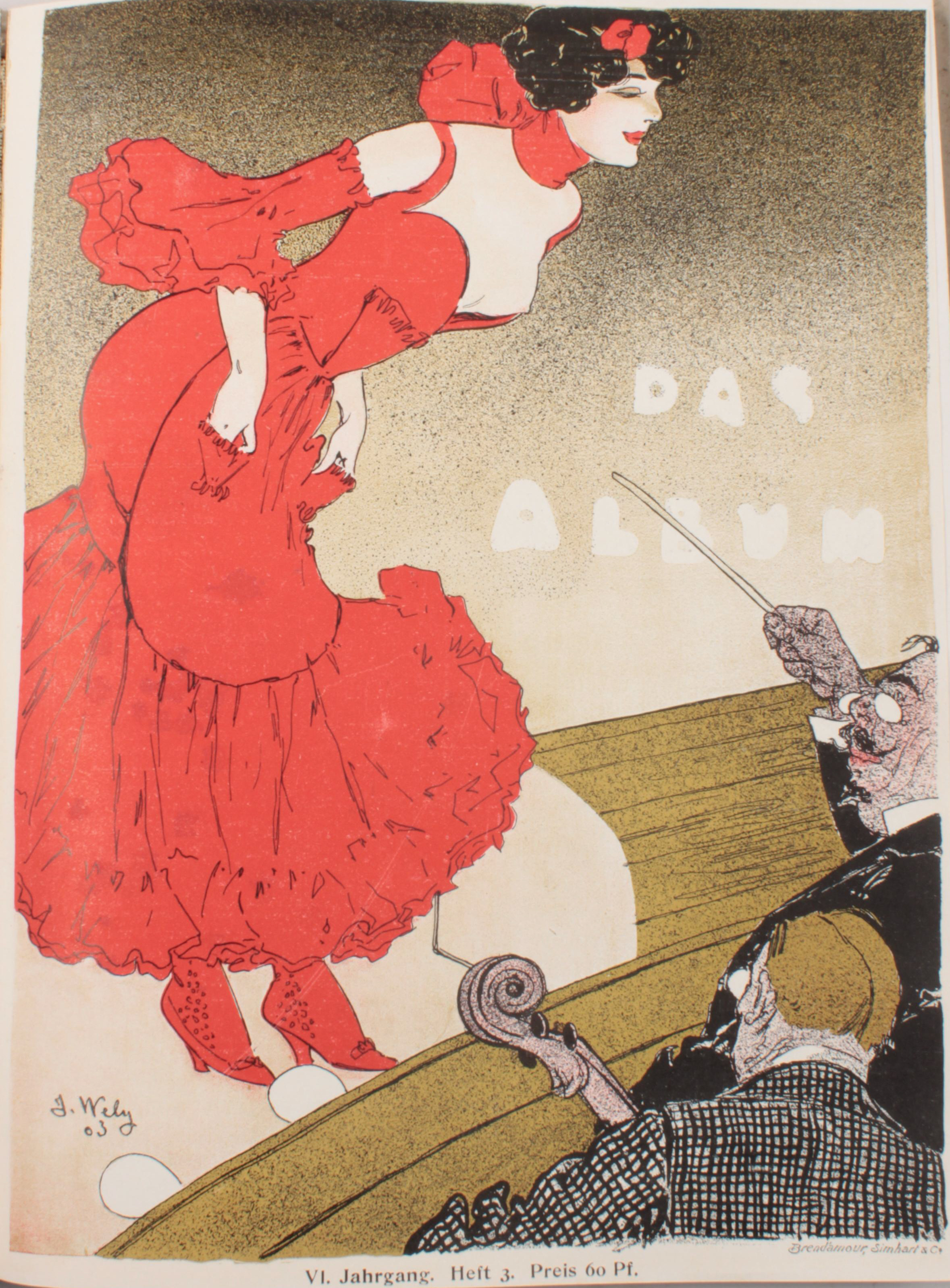 Das Album (Monatsschrift für Pariser Kunst und Literatur). Jahrgang VI, Heft 3. Illustration von Jacques Wély.